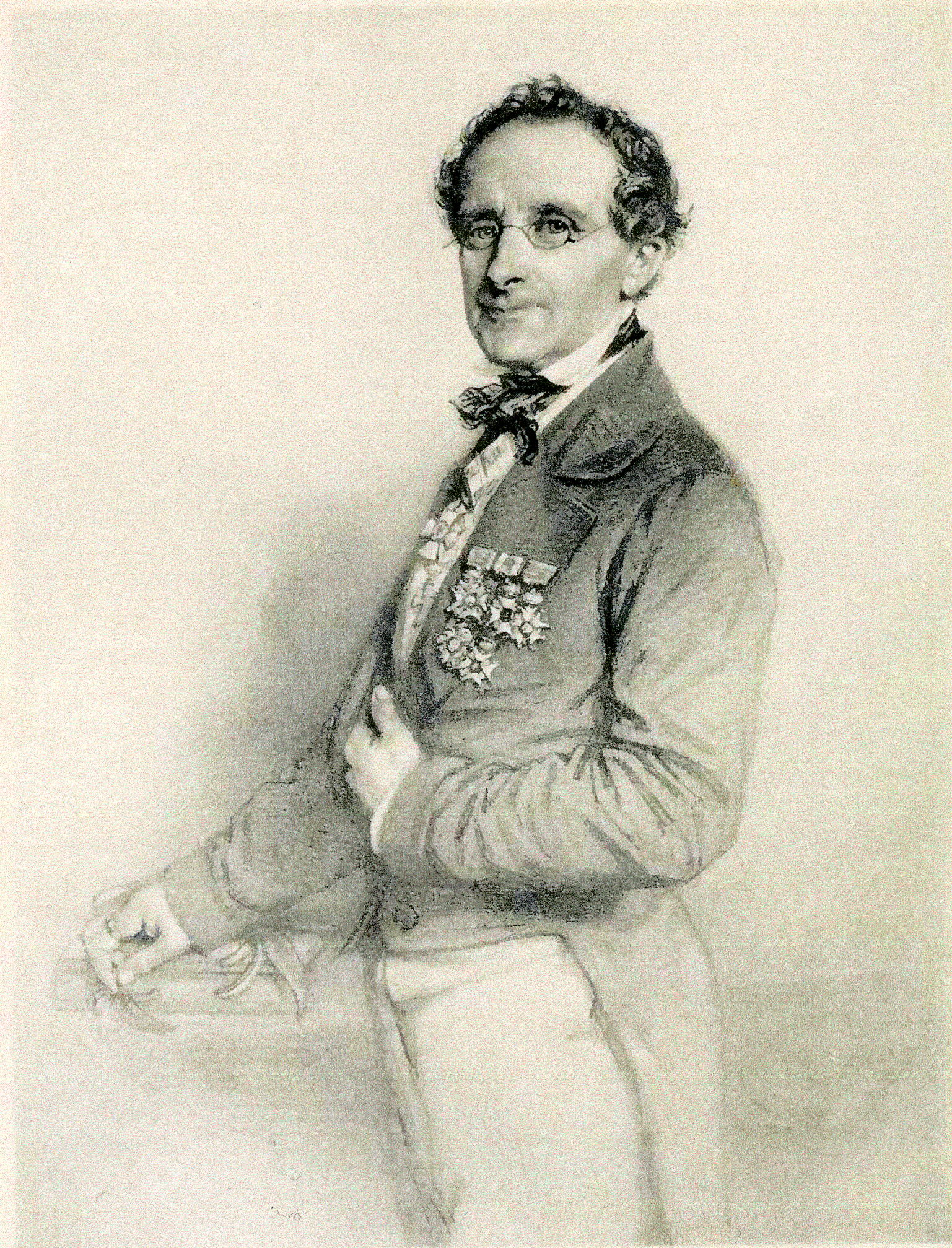 Karl Ludwig Blume deutsch-niederländischer Botaniker Unknown